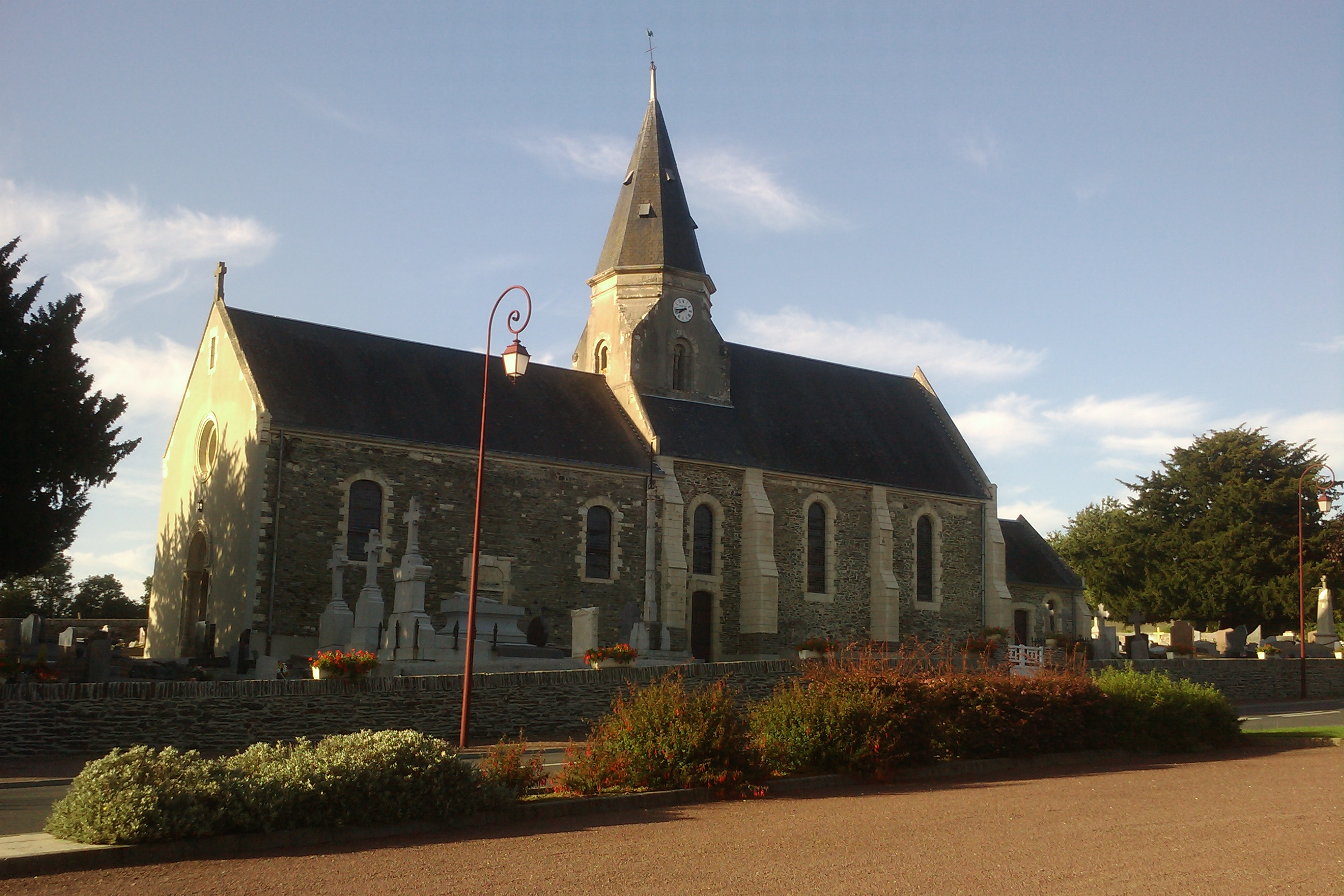 Église Saint-Gildard de Bérigny